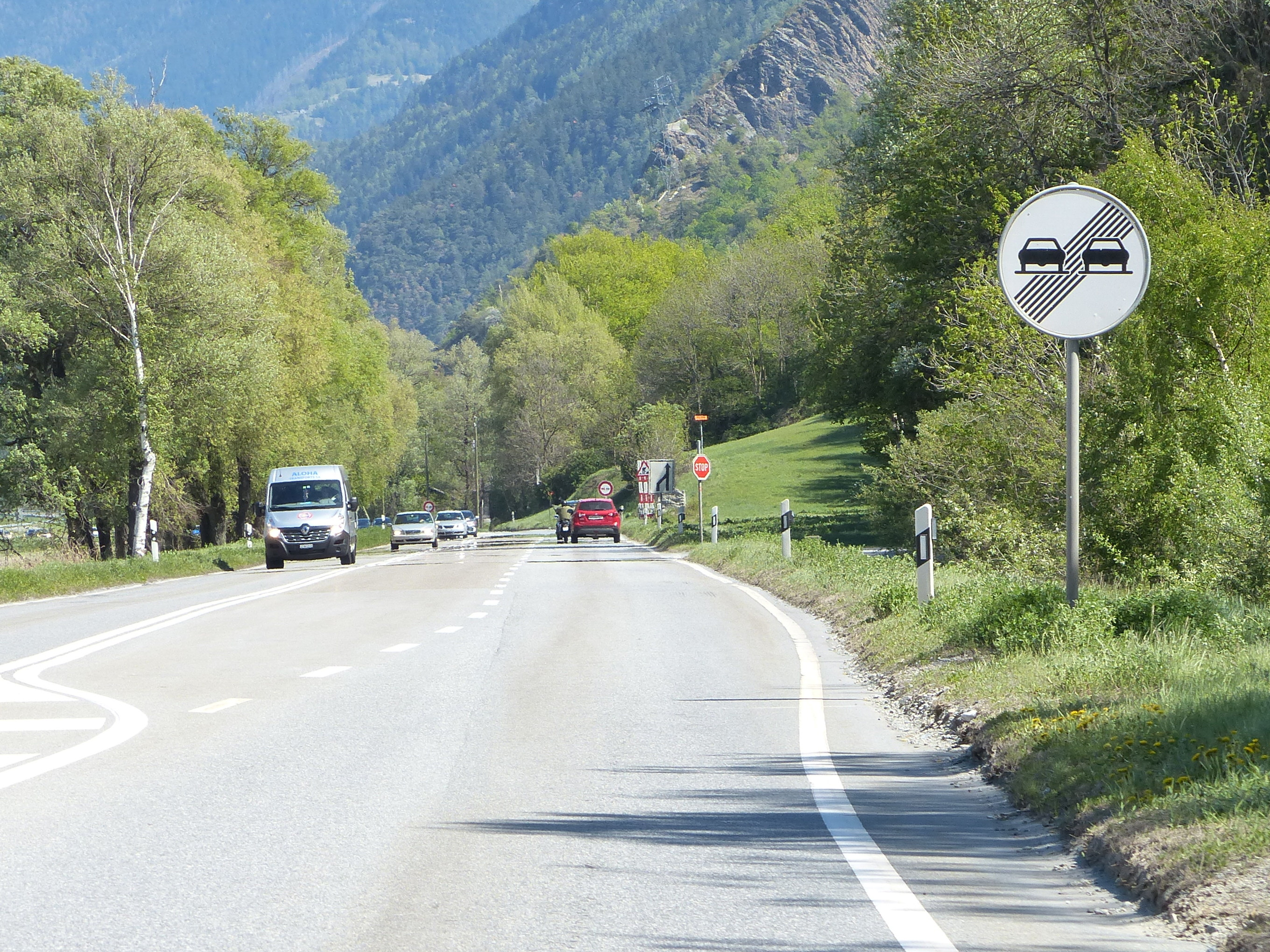 Panneau 2.55 sur la route nationale N9, canton du Valais, Suisse.